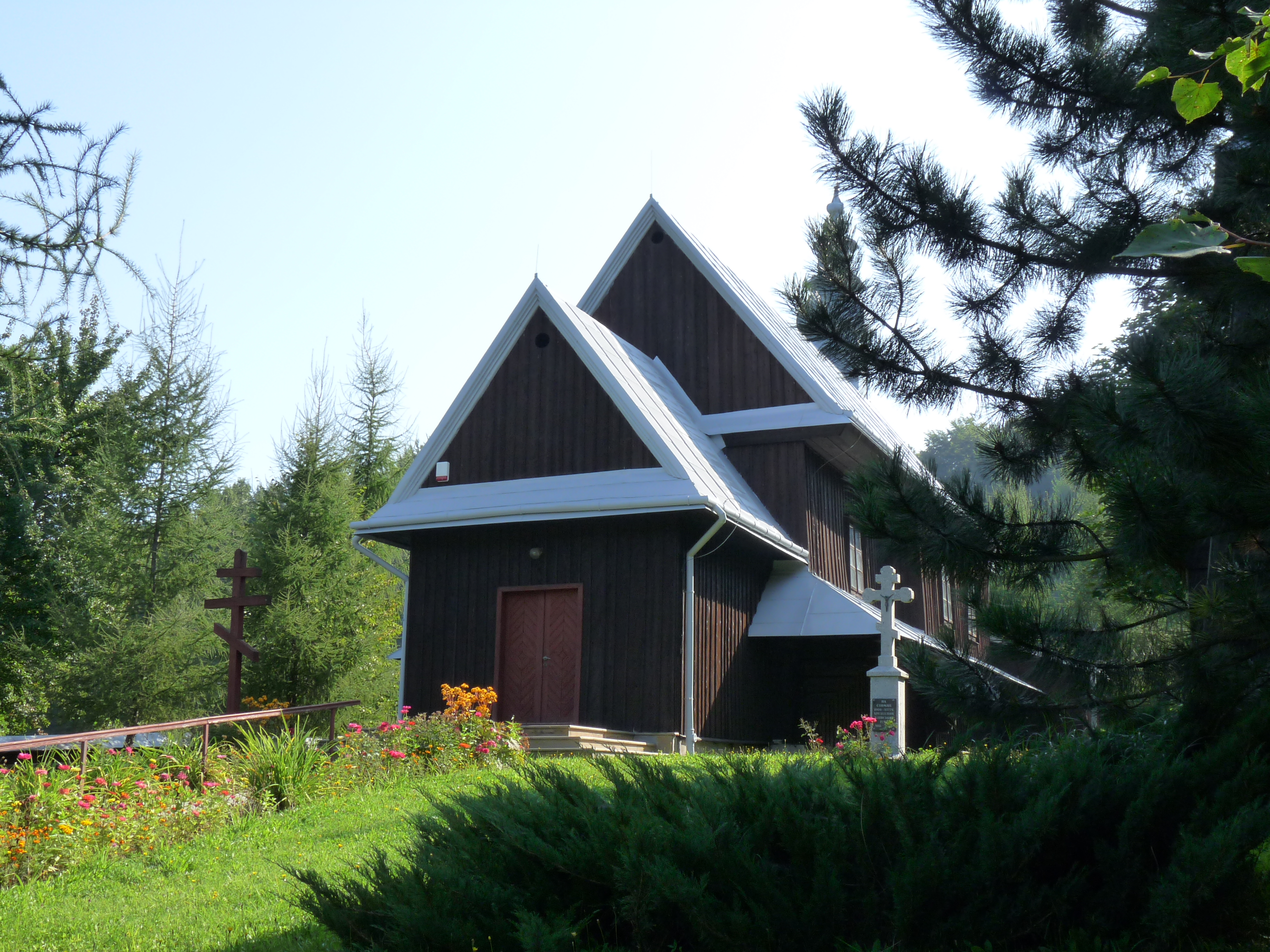 Rozdziele - cerkiew Narodzenia Najświętszej Marii Panny (przeniesiona z Serednicy)